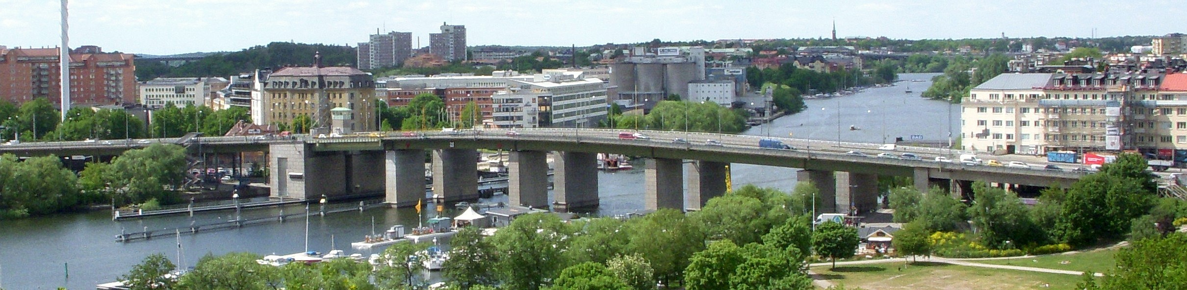 Liljeholmsbron sedd från Tantolunden